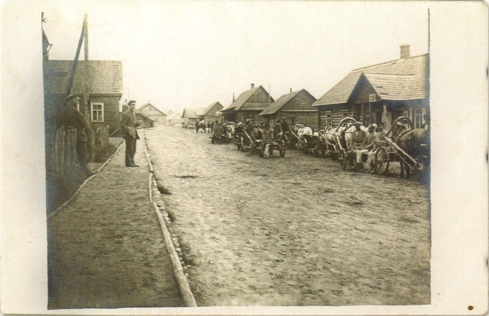 Беларуская (тарашкевіца): Пухавічы (Puchavičy), гасьцінец Турынскі (haściniec Turynski)